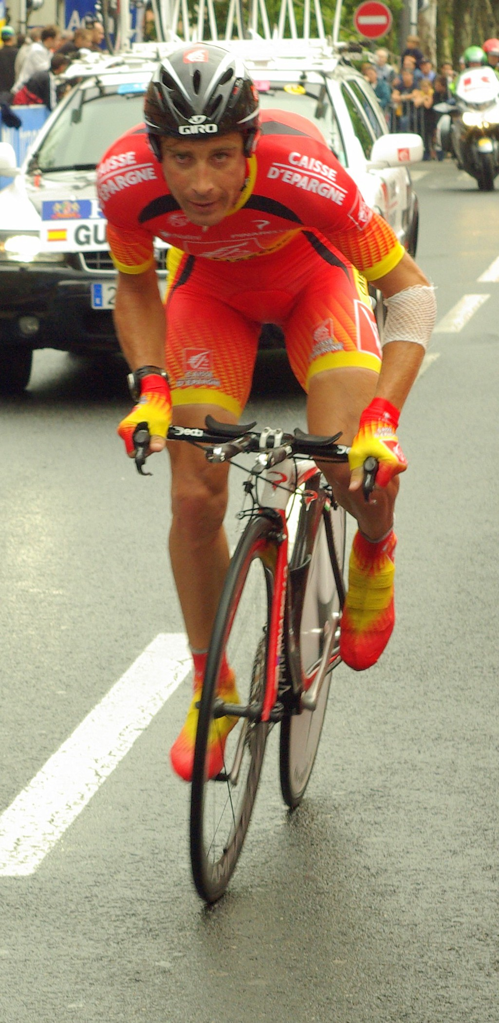 José Iván Gutiérrez (Tour de France 2007, 13e etappe).